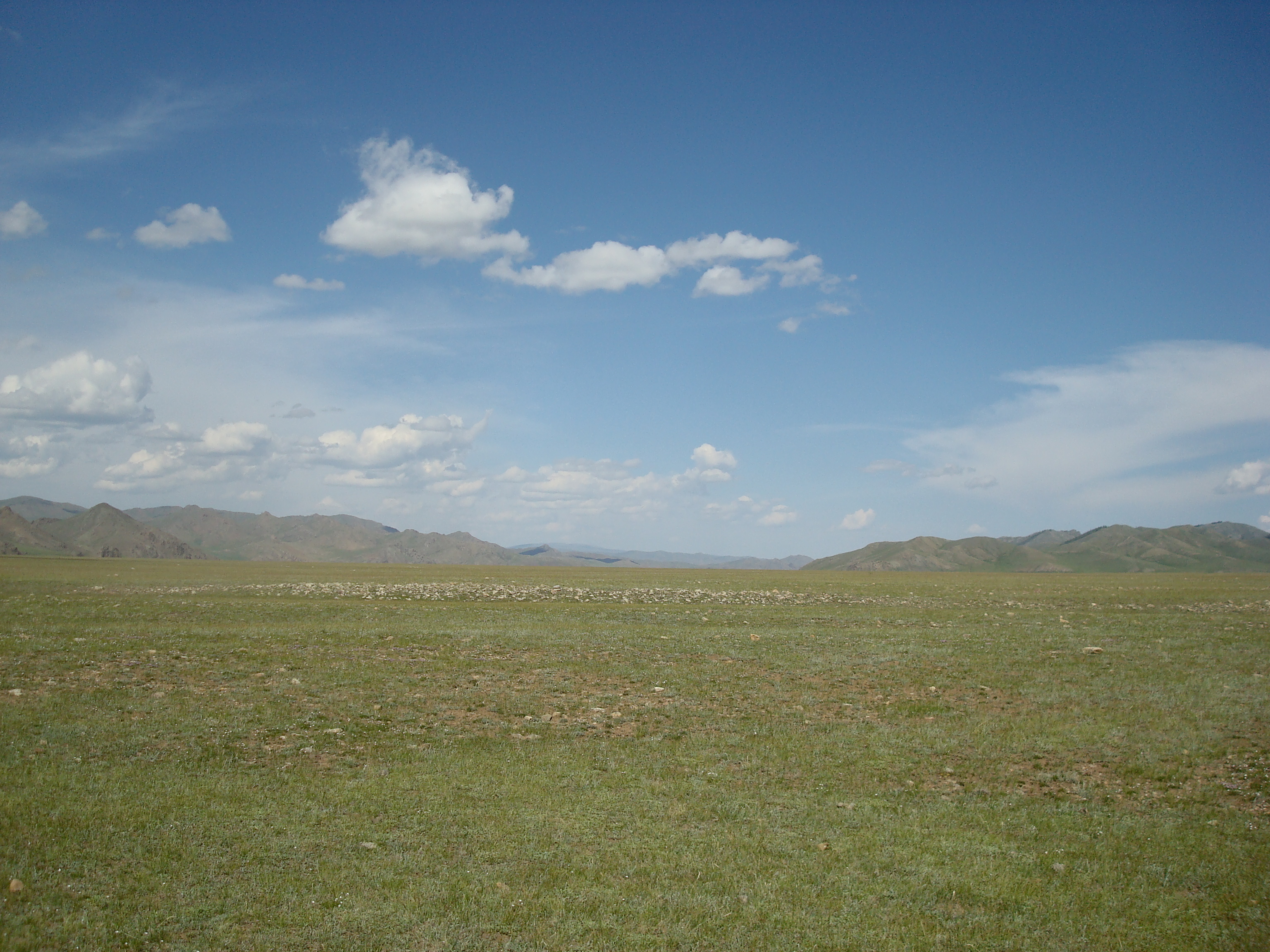 Grassteppe im Chöwsgöl-Aimag